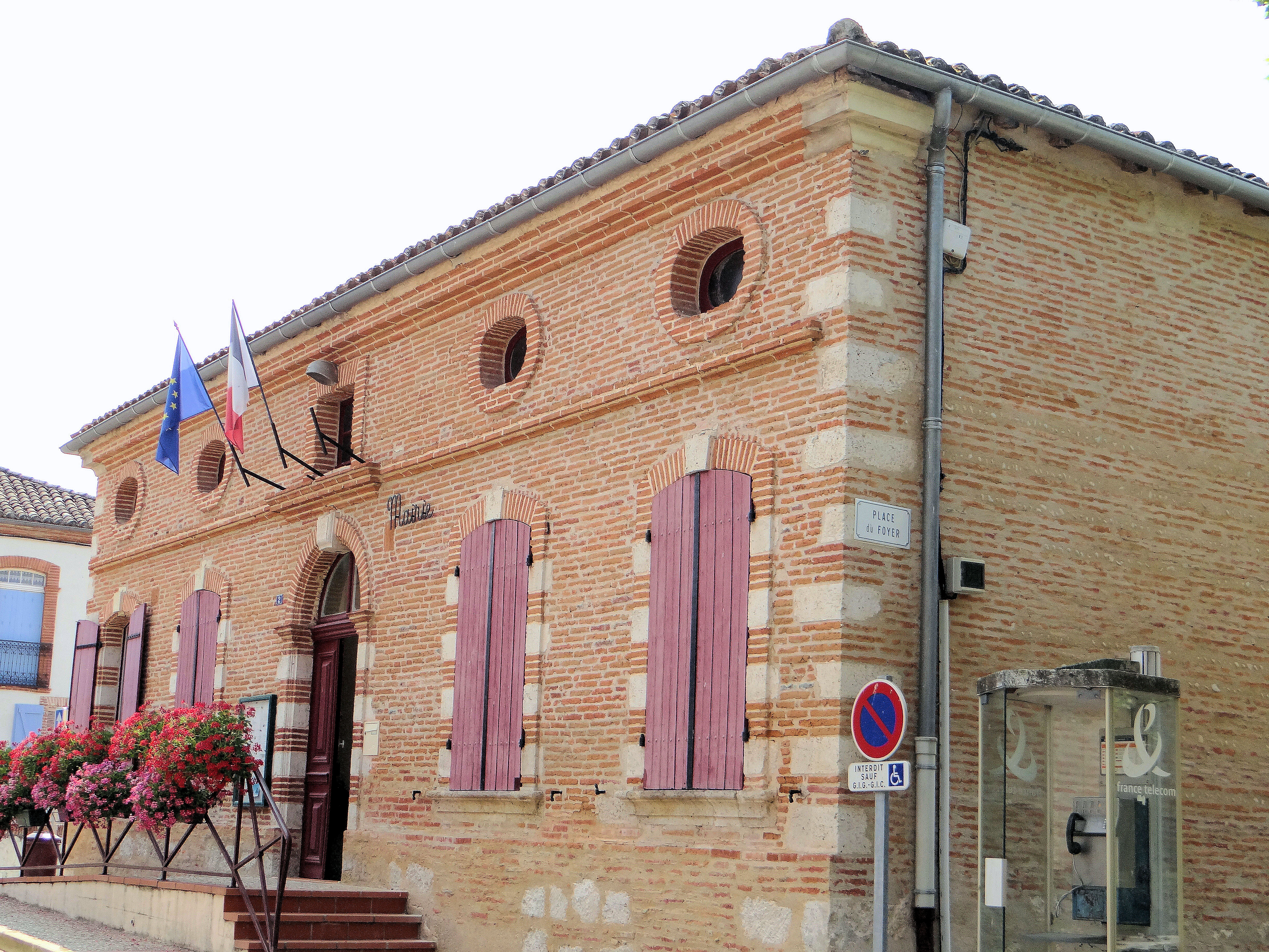 Castelmayran - Mairie